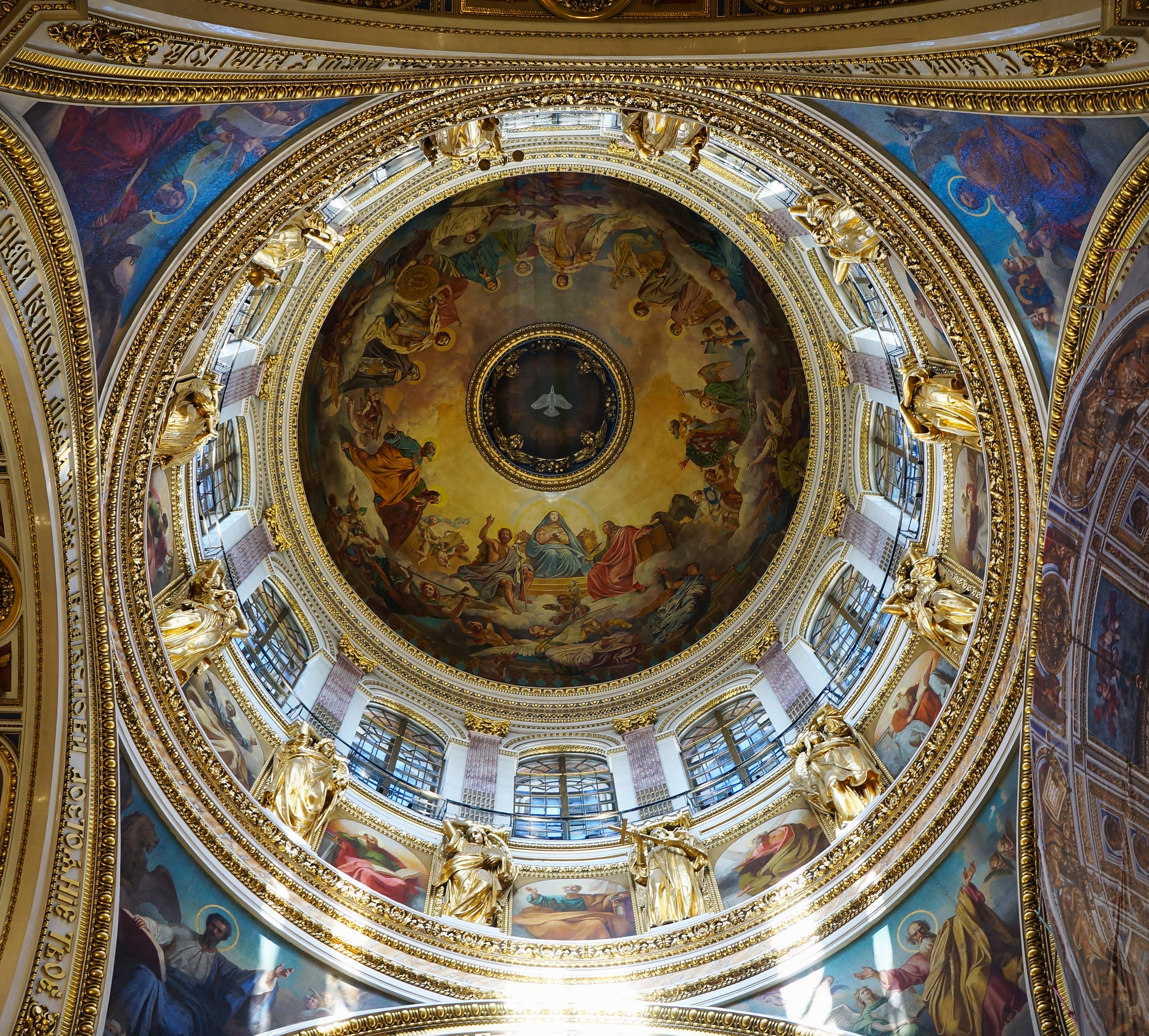 Dome de la cathédrale Saint Isaac, Saint Petersburg